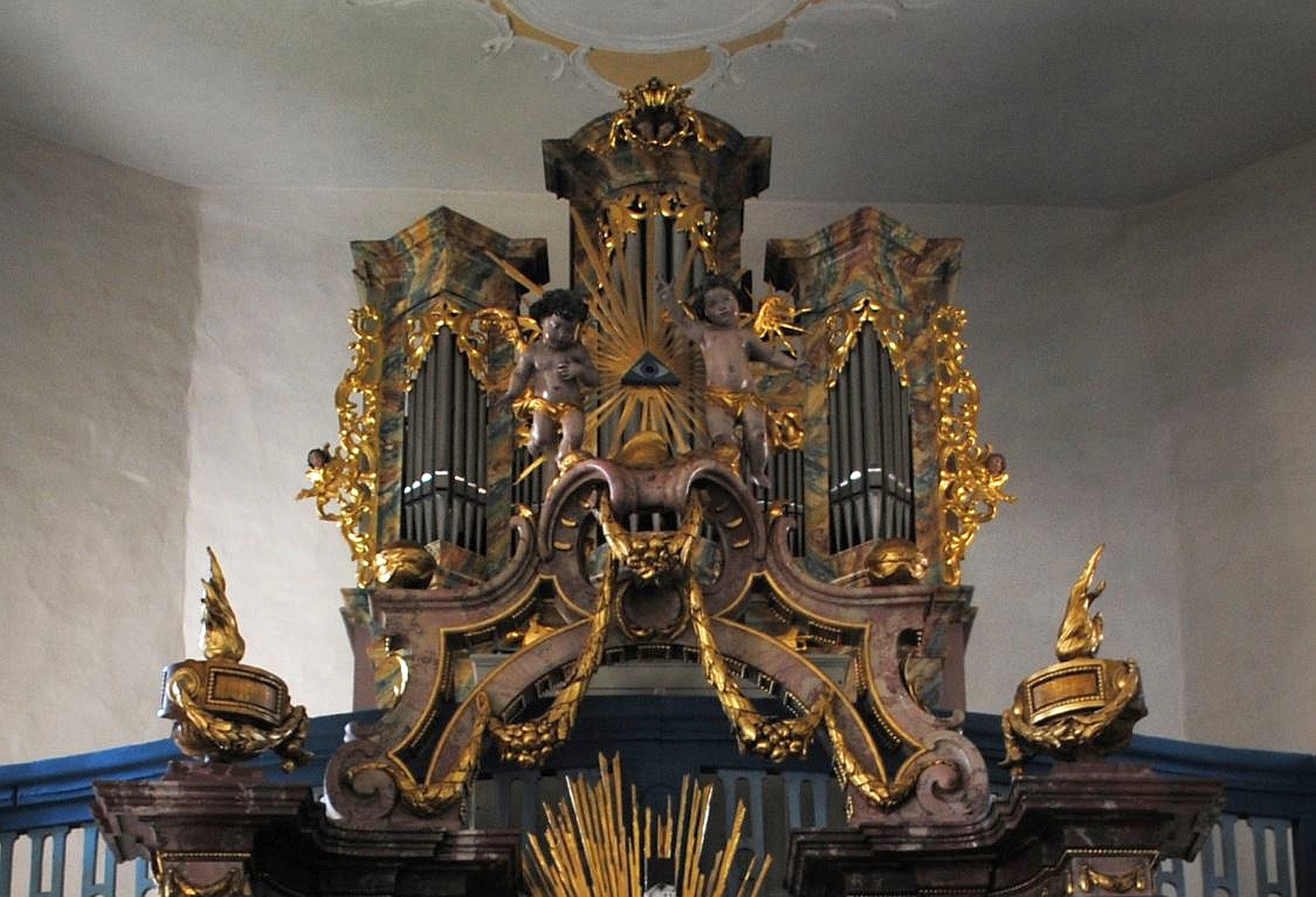 1903 erbaute Orgel von Johannes Strebel in der Pfarrkirche St. Andreas (Schernau)